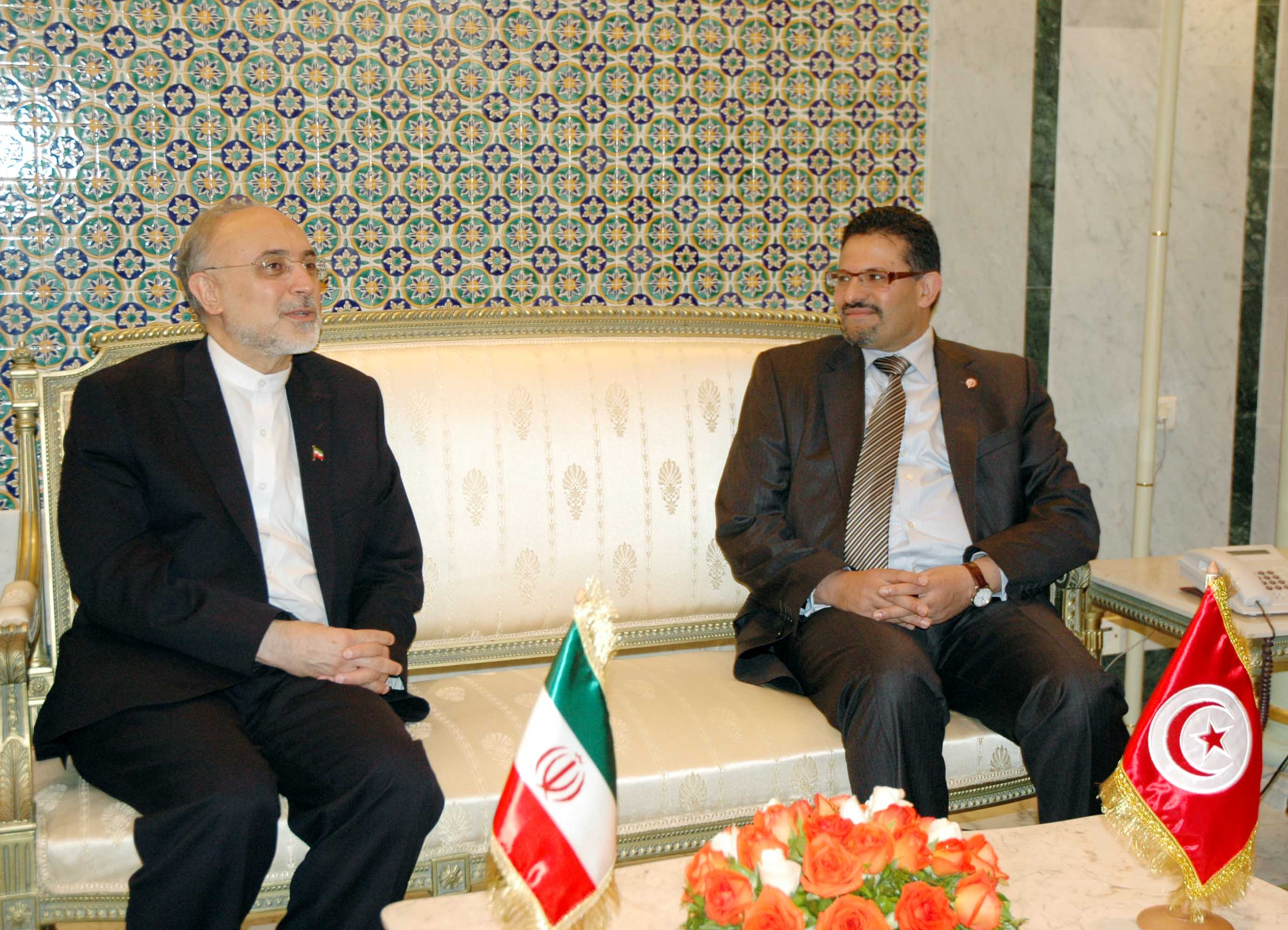 Visite de travail du Ministre des Affaires Etrangères de la République Islamique d'Iran